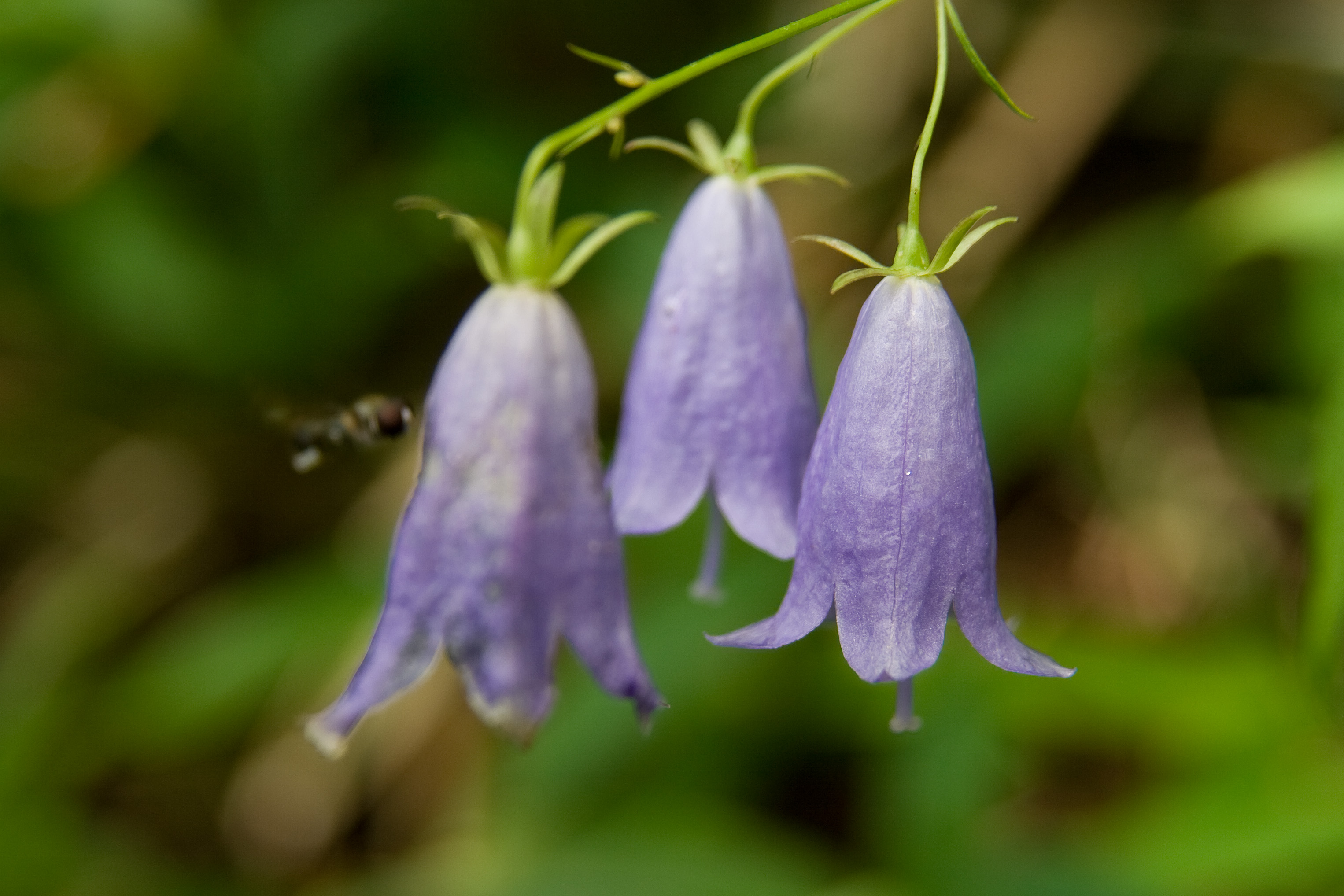 ヒメシャジン (学名:Adenophora nikoensis)